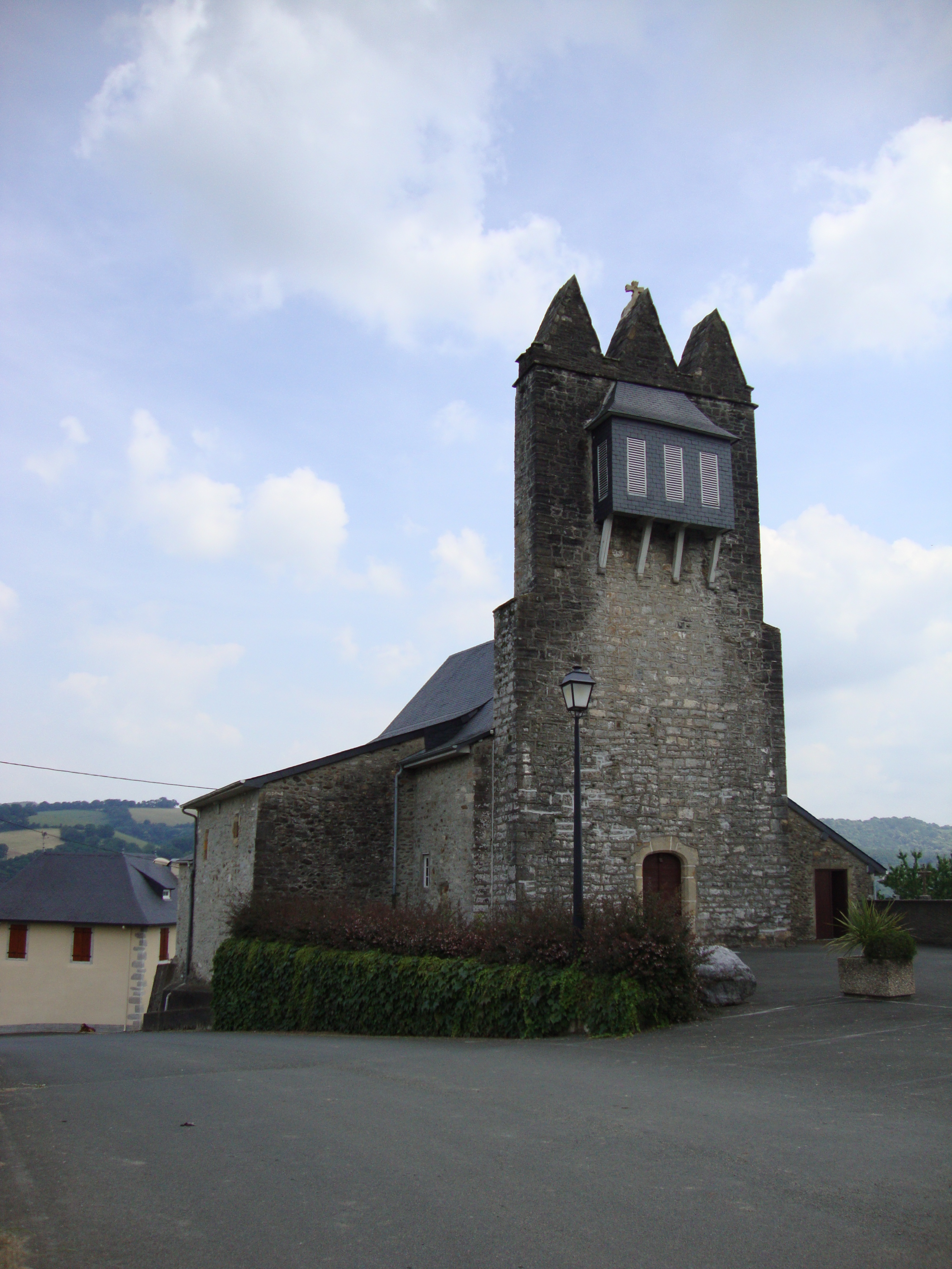 Undurein (Espès-Undurein, Pyr-Atl, Fr) église trinitaire, vue sous angle